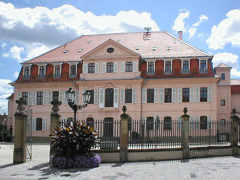 Stadionsches Schloss in Bönnigheim